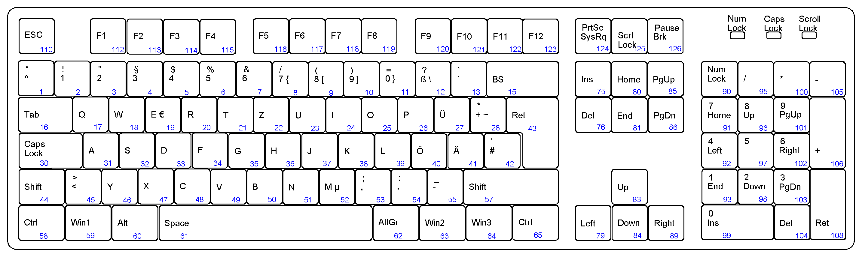 dt. MF2-Tastatur mit Durchnummerierung der Tasten, farbig